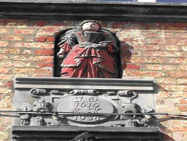 Figuren over døren på facaden mod Østerå